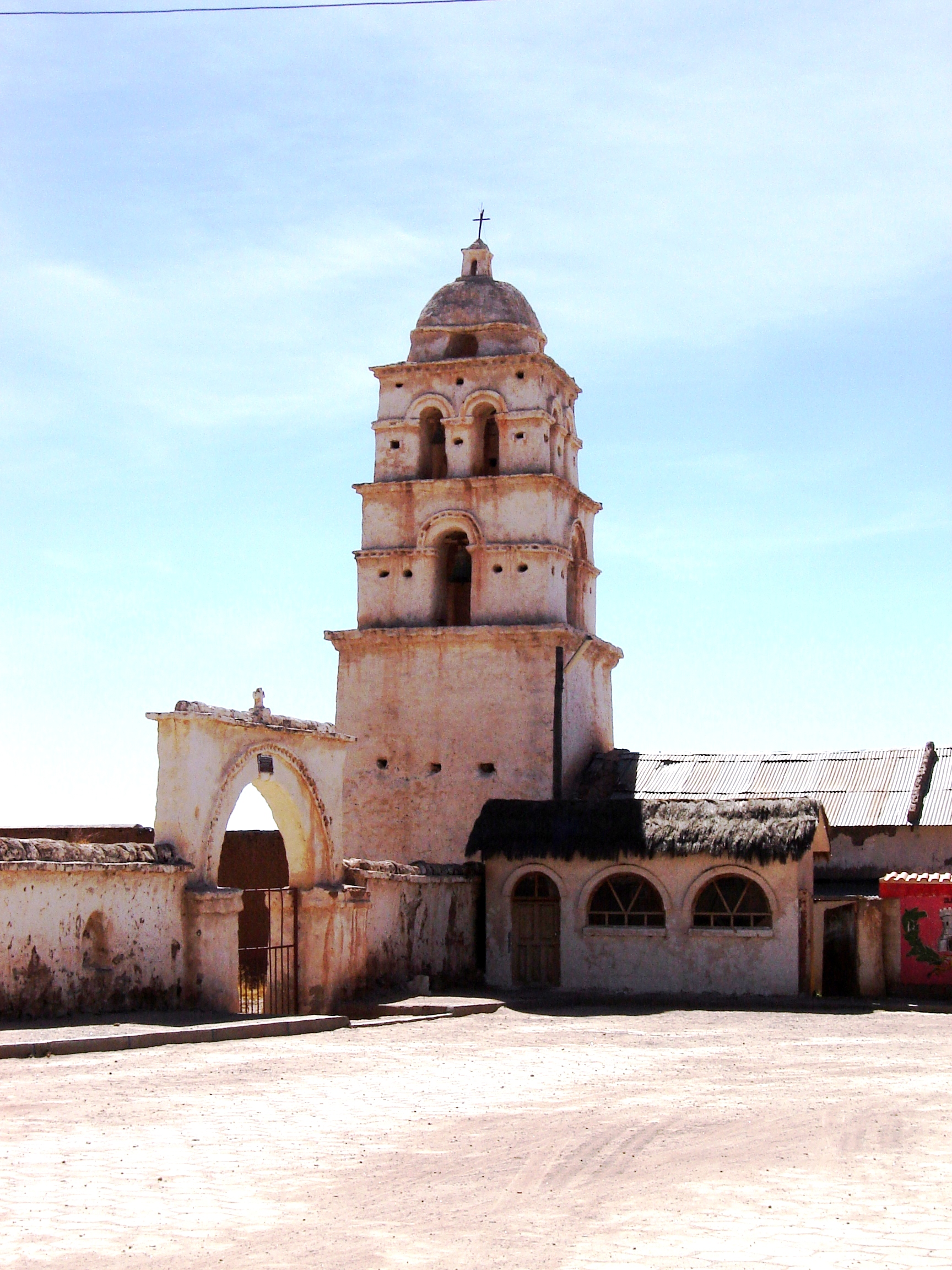 Iglesia de Curahuara de Carangas en Sajama, Oruro, Bolivia. This medium shows the protected monument with the number O/00-013 in Bolivia.